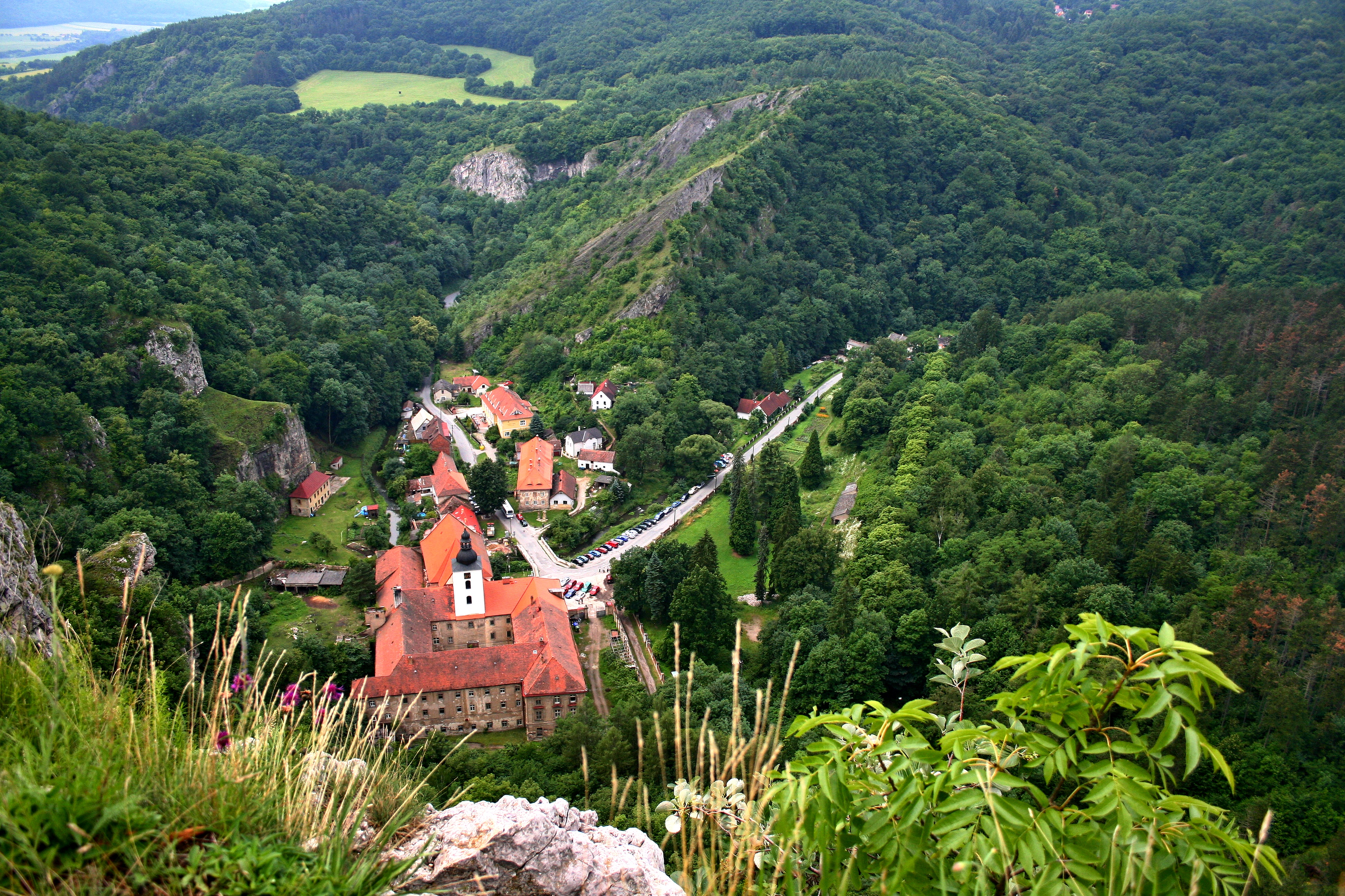 Benediktinský klášter Svatý Jan pod Skalou, Svatý Jan pod Skalou 1, 40, Svatý Jan pod Skalou.